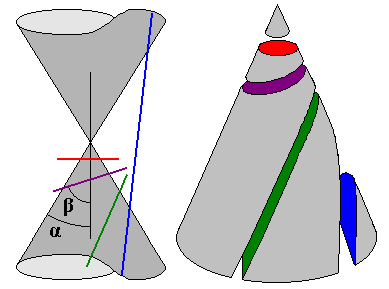 De Enciclopedia Libre. Original de Hfastedge, modificada por En Wikipedia no se pué firmar.